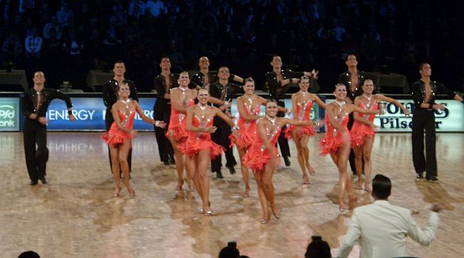 Lateinformation des Aachener TSC Blau Silber bei der Deutschen Meisterschaft der Formationen 2009